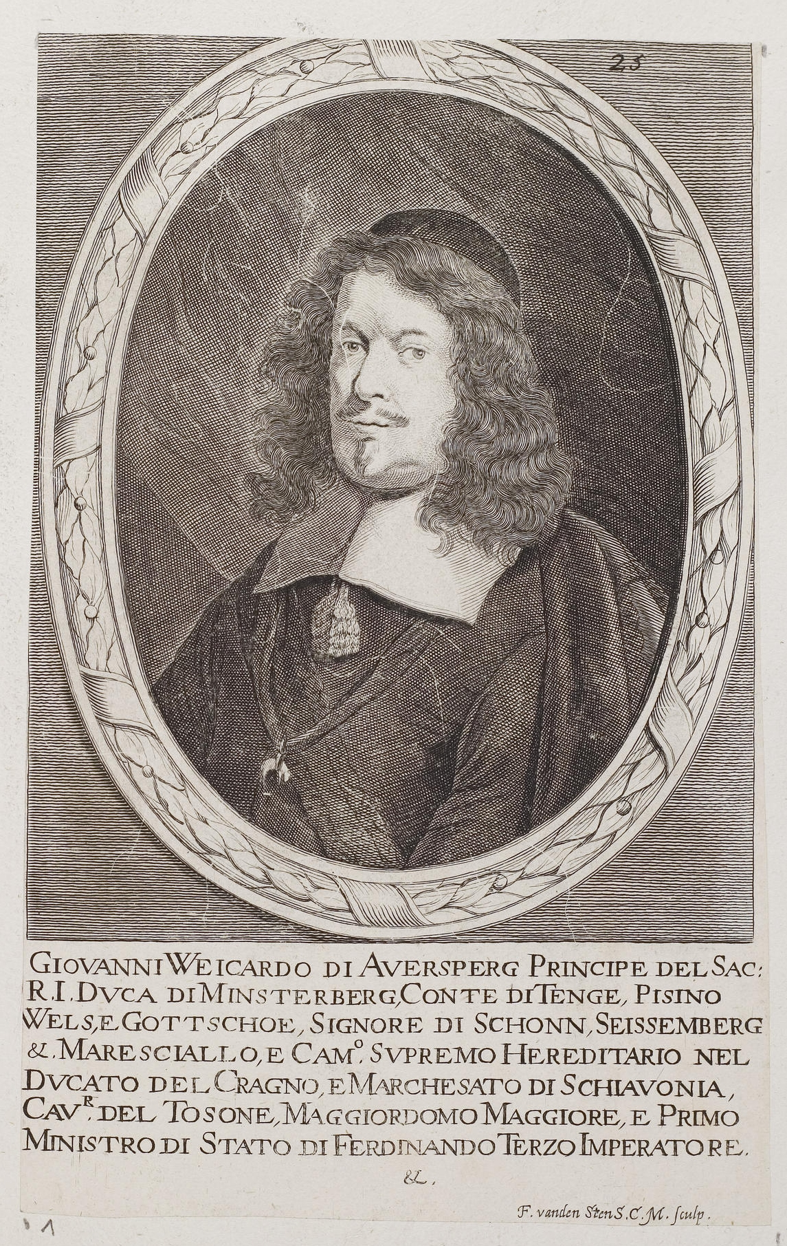 Grafik aus dem Klebeband Nr. 2 der Fürstlich Waldeckschen Hofbibliothek Arolsen Motiv: Johann Weikhard von Auersperg, österreichischer Minister, der erste Fürst von Auersperg, Reichsfürst von Tengen und Herzog von Münsterberg